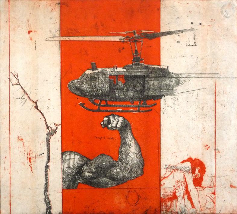 Peter Sorge, Heißer Sommer II, 1967, Farbradierung auf Kupferdruckbütten, Platte 39,5 x 44 cm, Blattmaß 54 x 62,8 cm, Auflage: 20, e.a., 2. Auflage 1970, Auflage XV, 5 e.a., von Sorge nummeriert, signiert und datiert